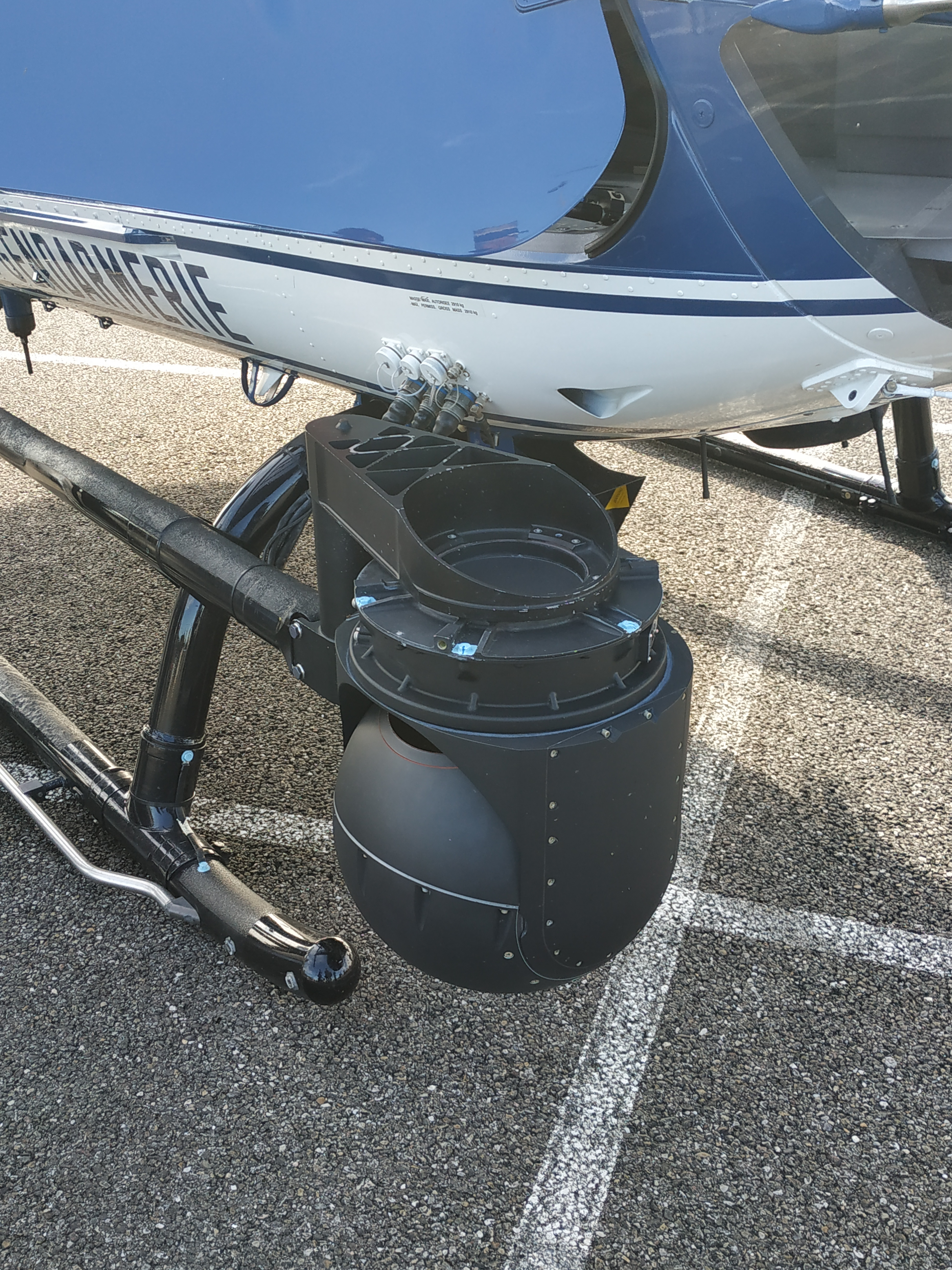 EC135 (ou H135) de la Gendarmerie nationale, immatriculé F-MJDJ, servant depuis Colmar/ Ici, vue de la caméra monté sur l'hélicoptère Photo prise à Mundolsheim dans le cadre des rencontres de la sécurité intérieure de 2019